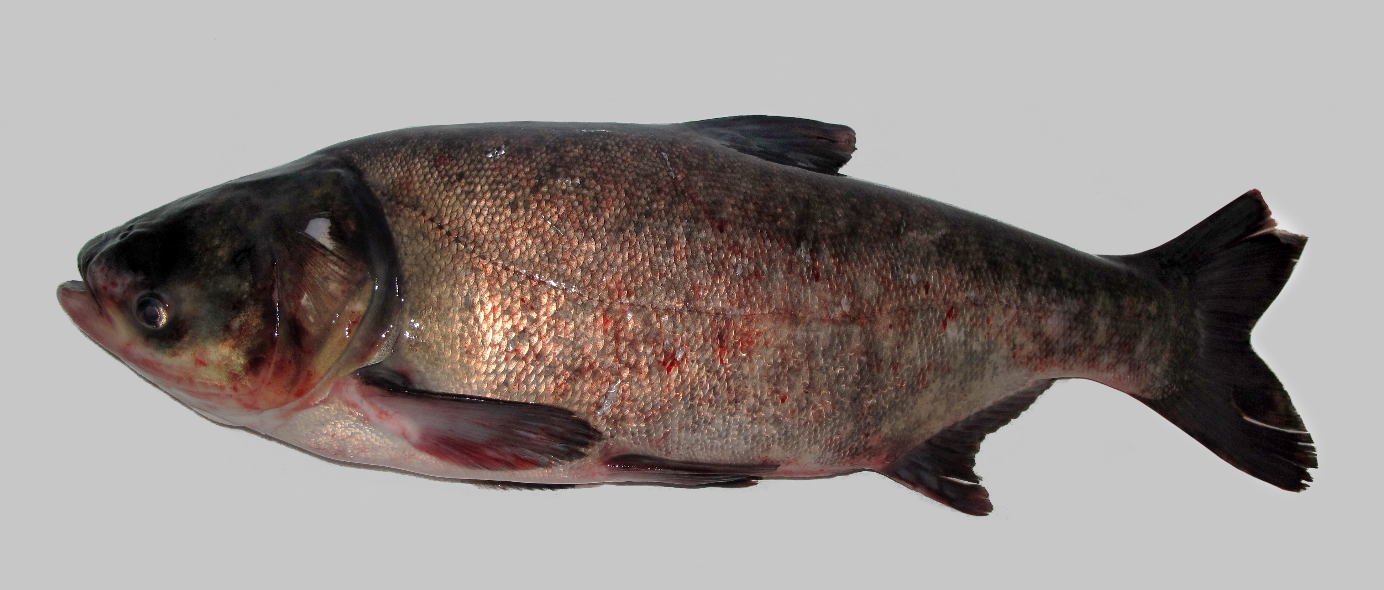 Tolstolobec pestrý, délka 63 cm, váha 3,8 kg, samec